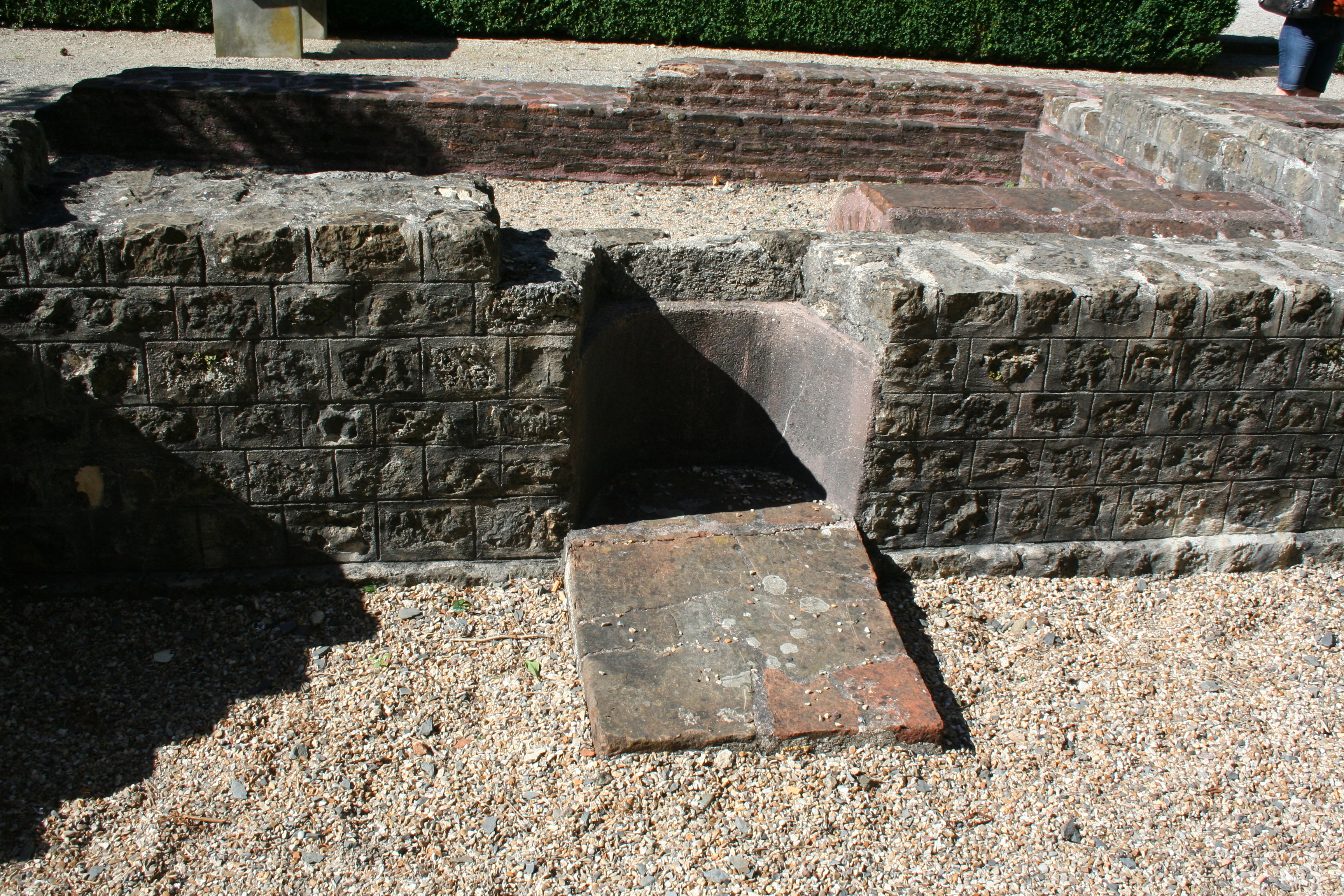 détail d'une des cuisines de la villa de Lisieux, jardin de l'hopital